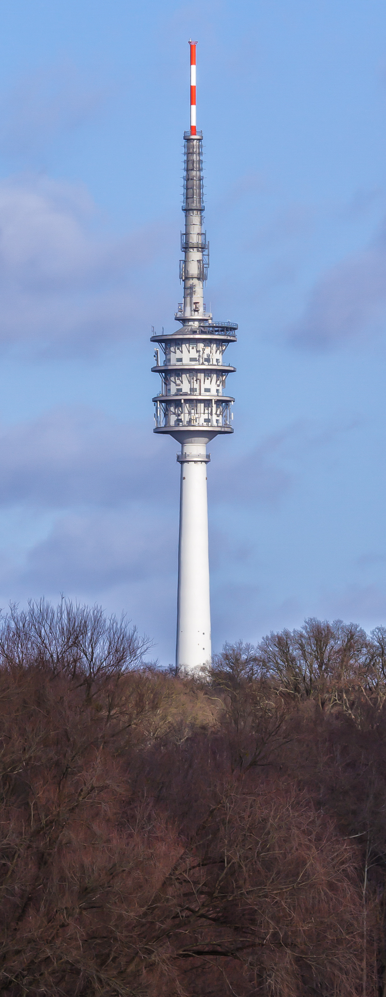 Berlin - Fernmeldeturm auf dem Schäferberg - 2013